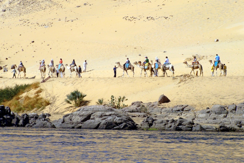 Kamel-Karawane am Ufer des Nils